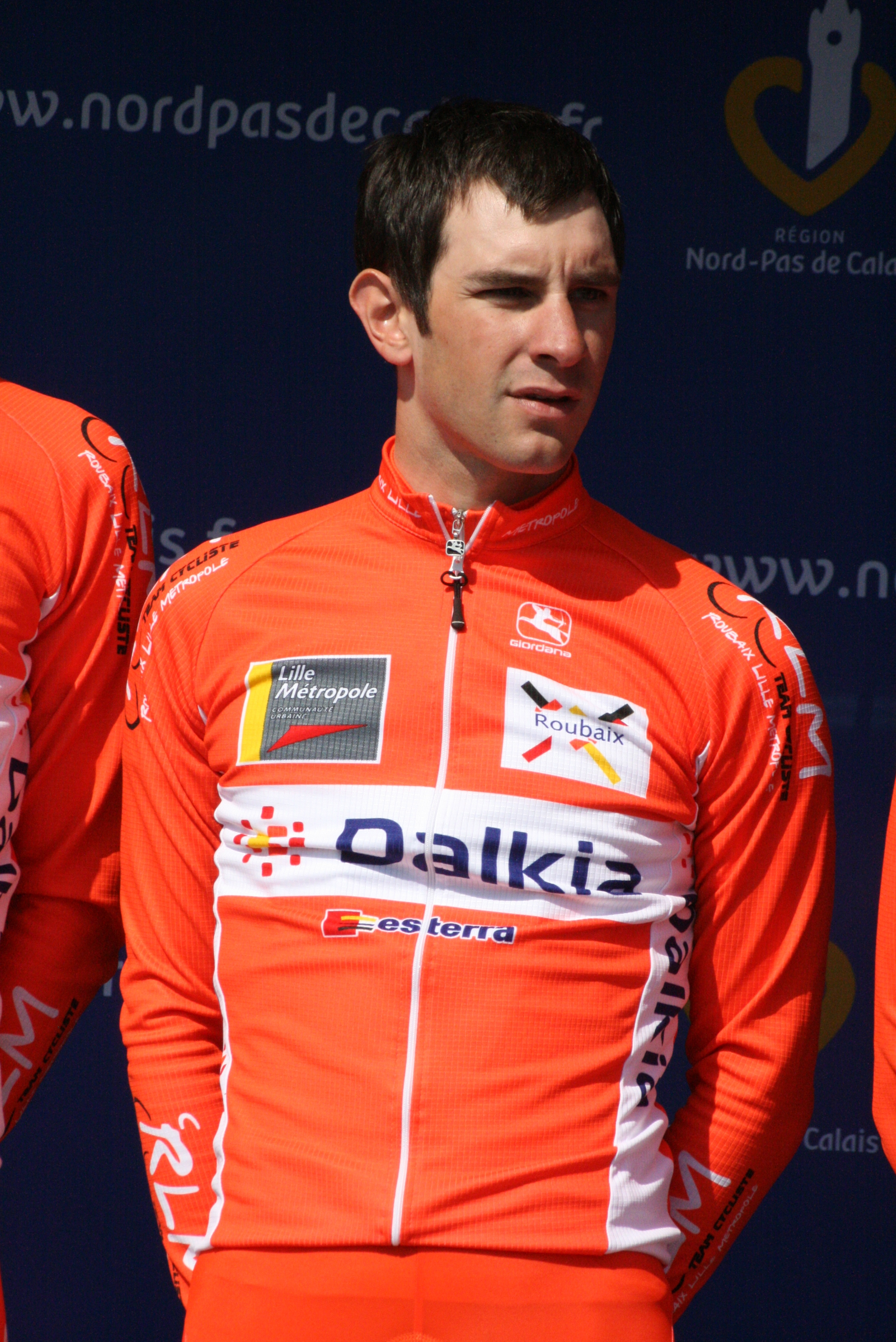 Présentation des coureurs au départ de la première étape Morgan Kneisky